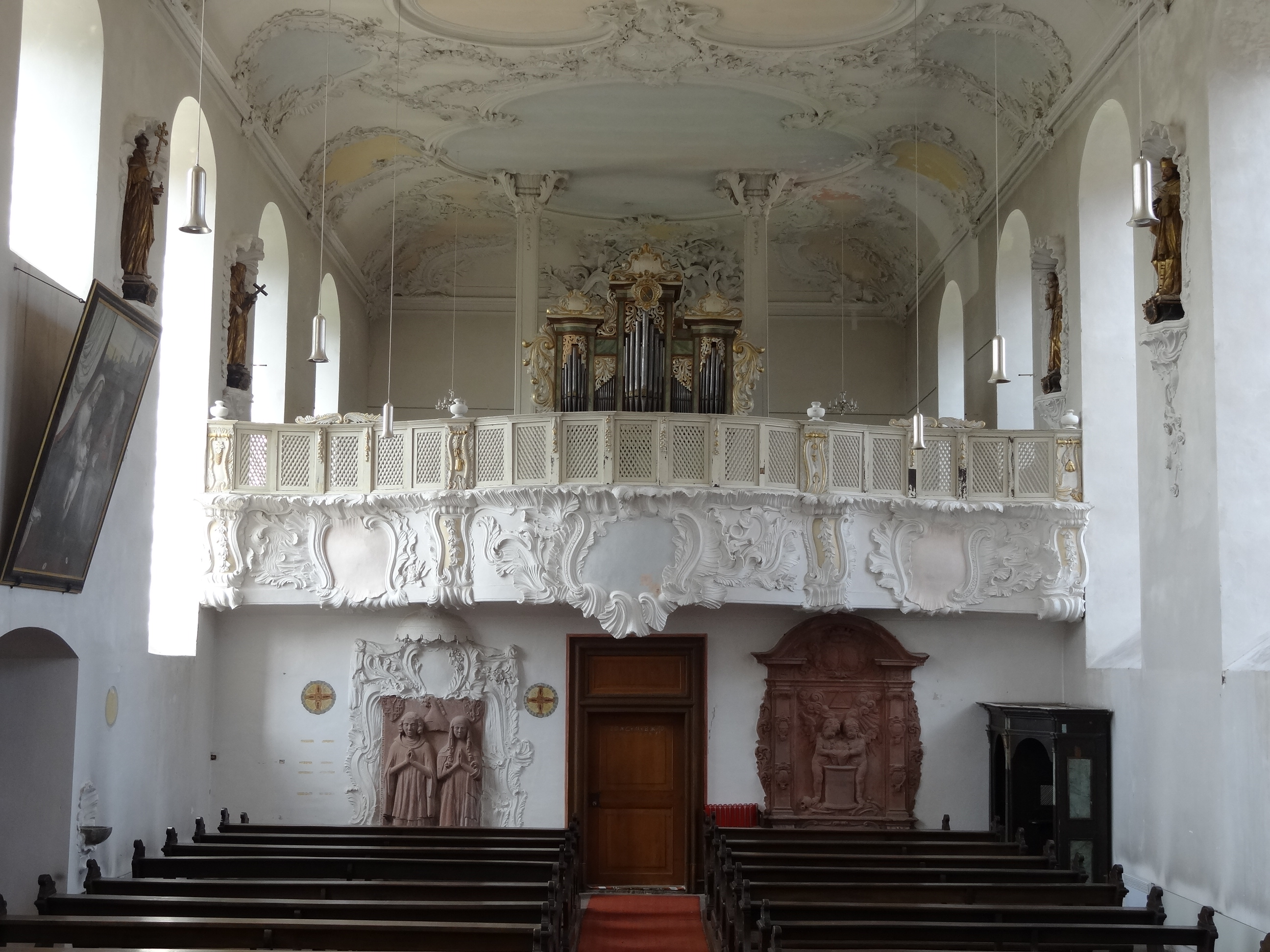 Klosterkirche (JVA Rockenberg)